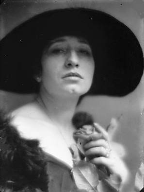 Wanda Capodaglio